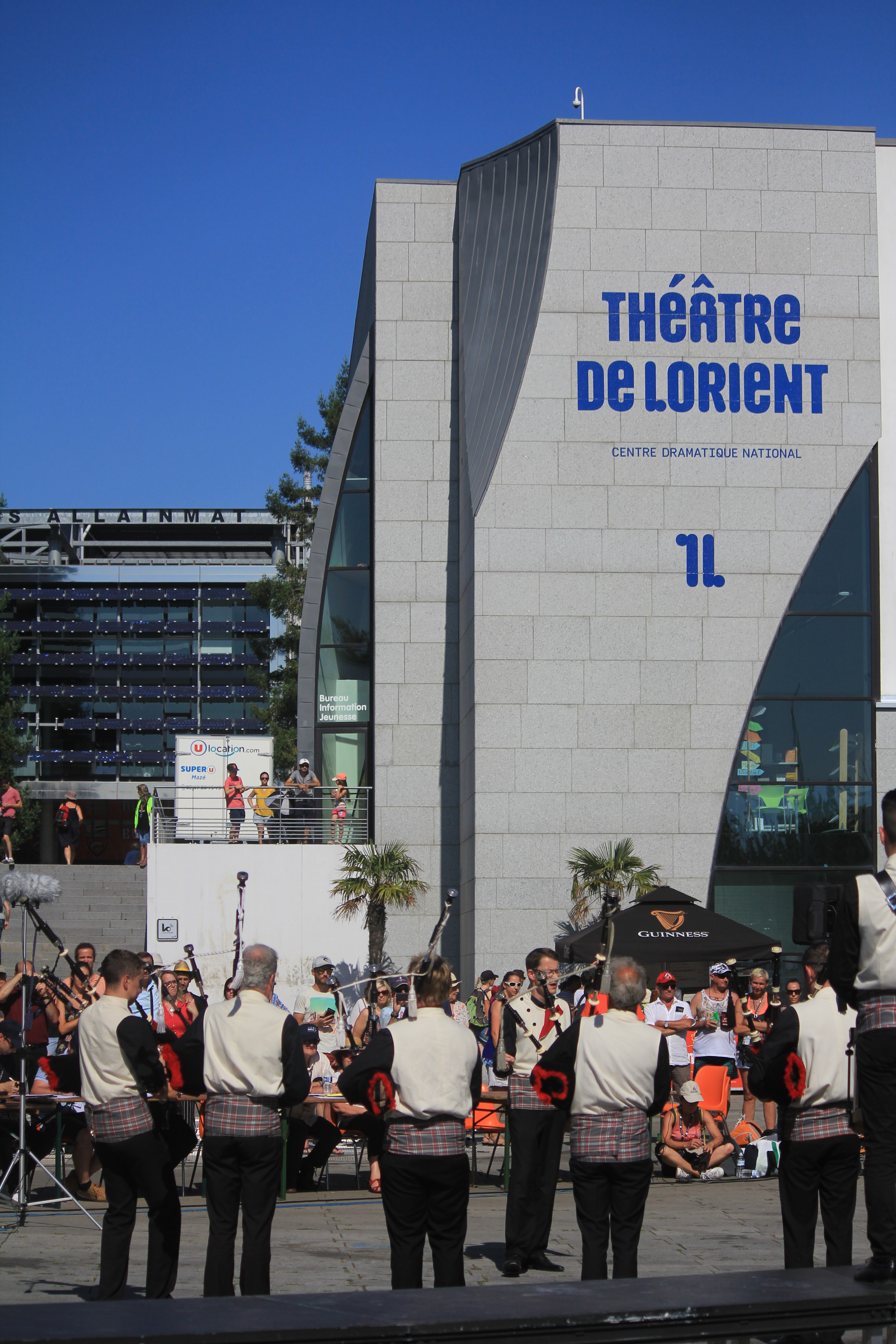 Bagad An Eor Du, lors du Championnat national des bagadoù de 4ème catégorie, organisé dans le cadre du festival interceltique de Lorient 2018.